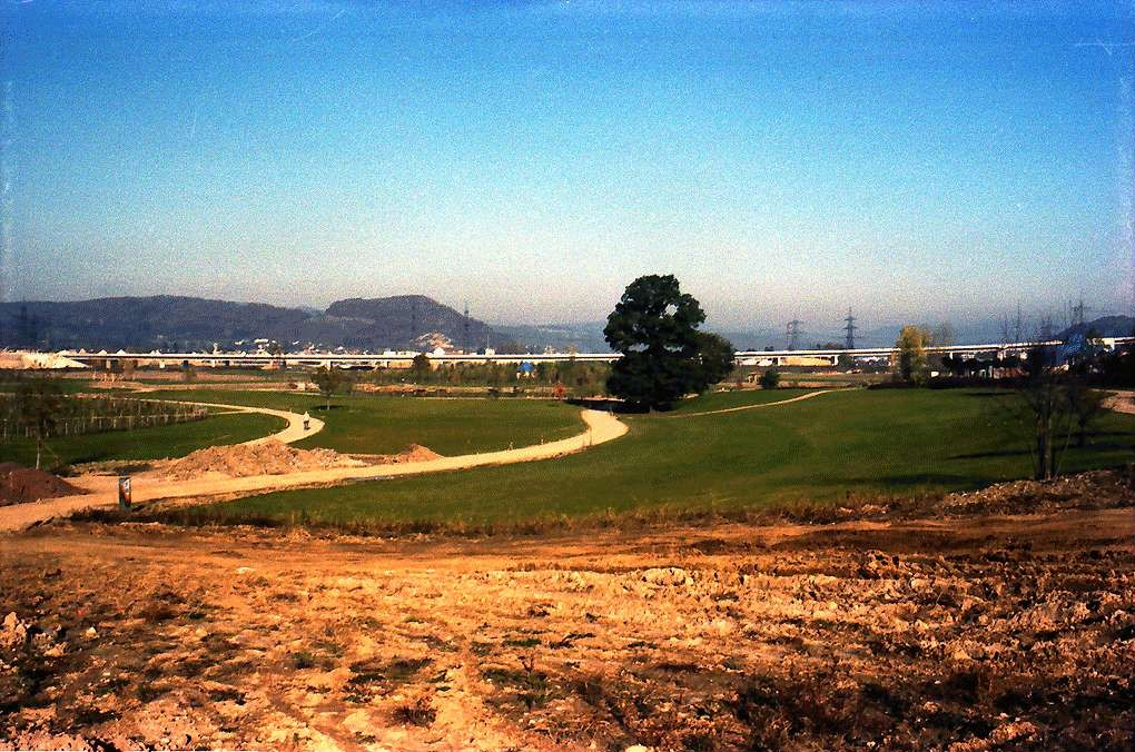 Lörrach: Landesgartenschaugelände im Bau, im Hintergrund die Autobahnbrücke